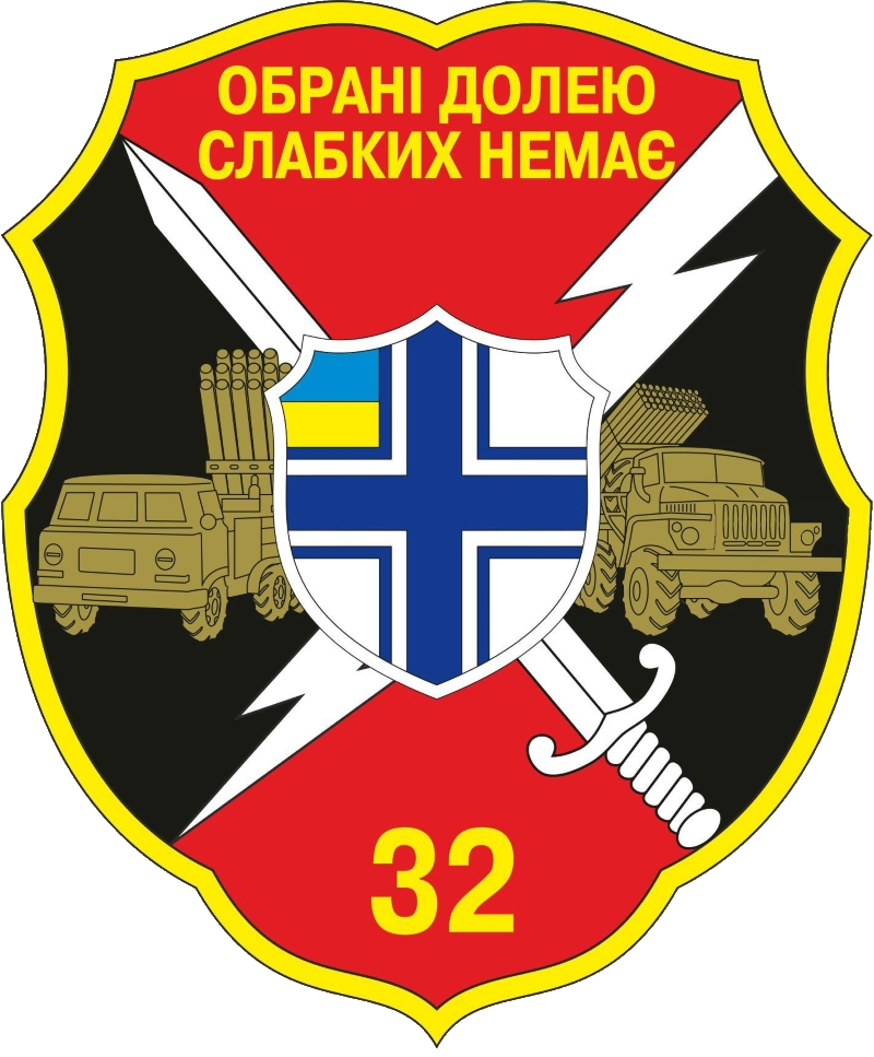 Нарукавний знак, 32 реактивний артилерійський полк